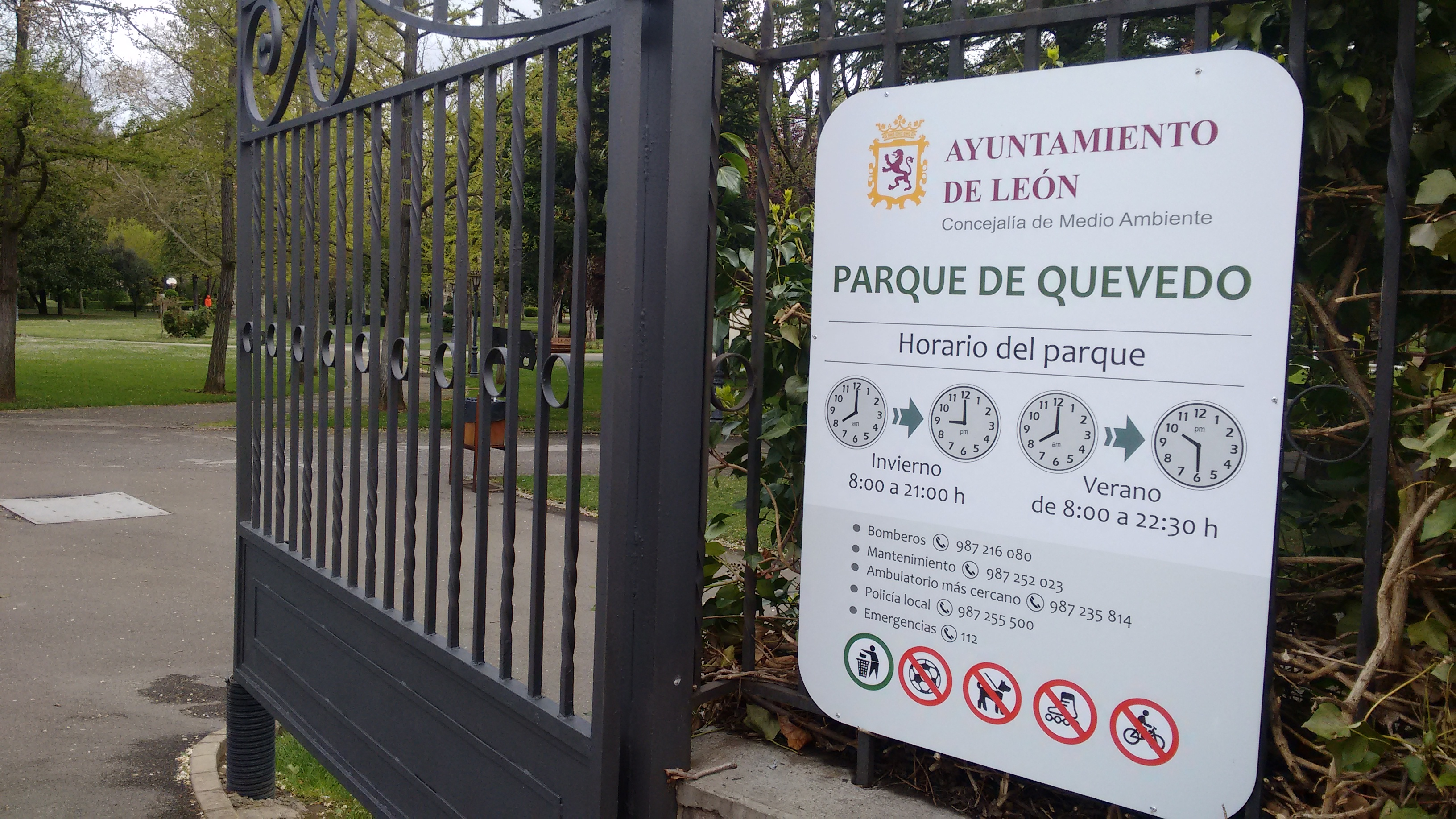 Cartel donde se puede observar los horarios de apertura en invierno y verano del parque, teléfonos de interés y recomendaciones y prohibiciones en cuanto al acceso al mismo.